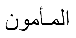 Аль-Мамун